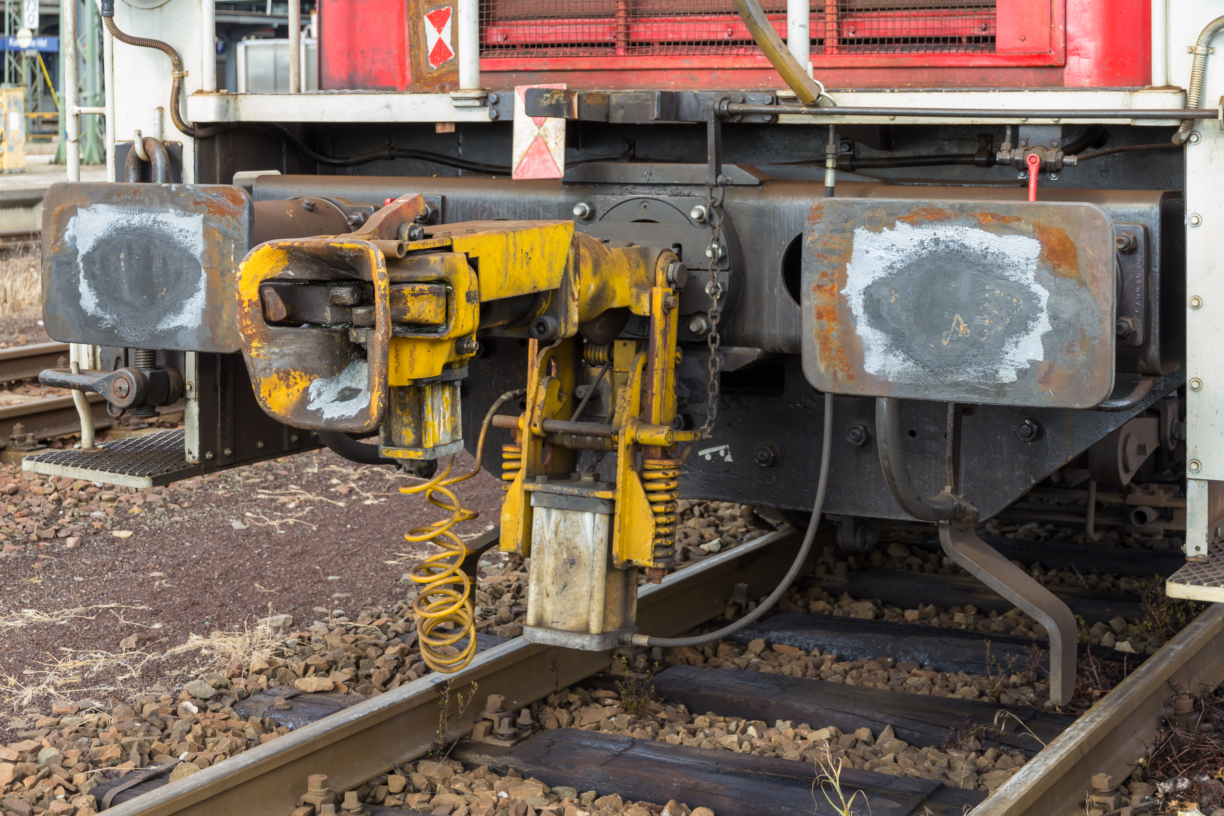 Rangierkupplung an einer Diesellok BR 363